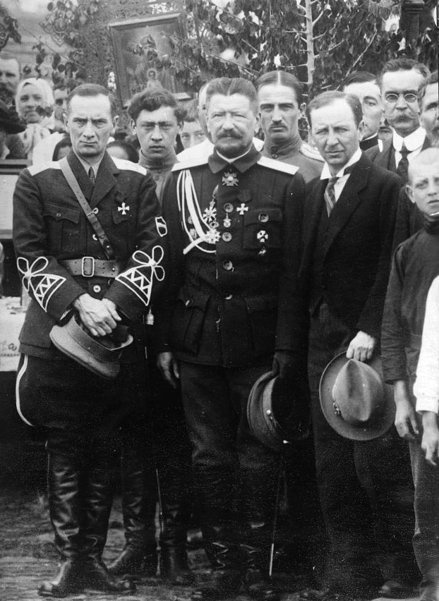 El almirante ruso Kolchak, izquierda, caudillo supremo del gobierno antibolchevique siberiano, el general Mijaíl Mijailovich Pleshkov, jefe del Estado Mayor de las tropas rusas del la zona del ferrocarril transmanchuriano y el cónsul ruso en Harbin, Popov.